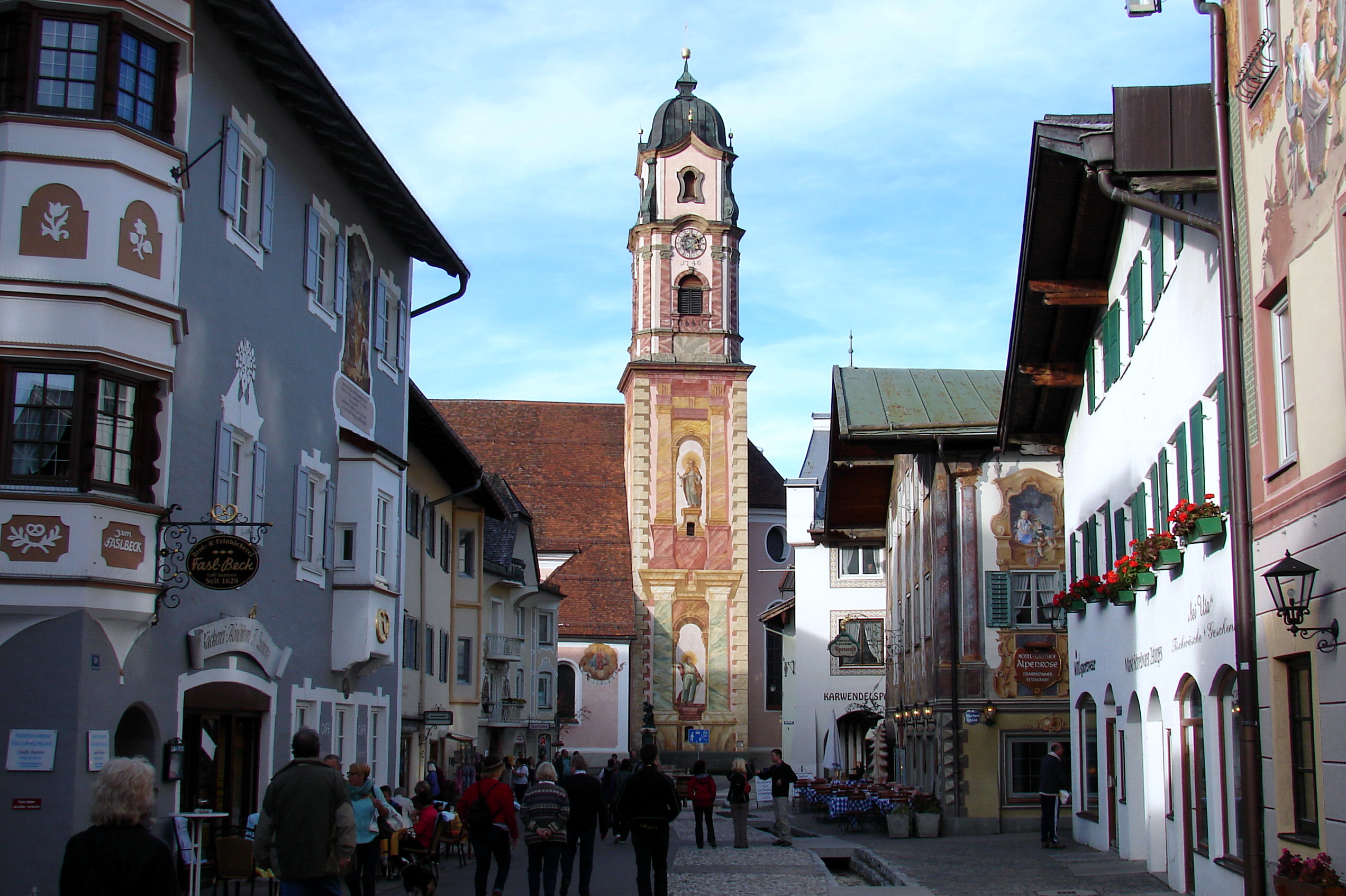 Das Wahrzeichen von Mittenwald ist der 1746 fertiggestellte, mit den Kirchenpatronen, Petrus und Paulus, bemalte Kirchturm.